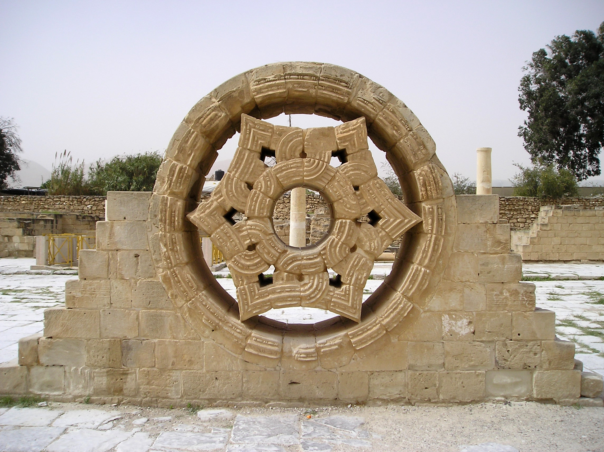 Kamienna rozeta z VIII w. w ruinach pałacu w Khirbet al-Mafjar w Jerychu (Autonomia Palestyńska)